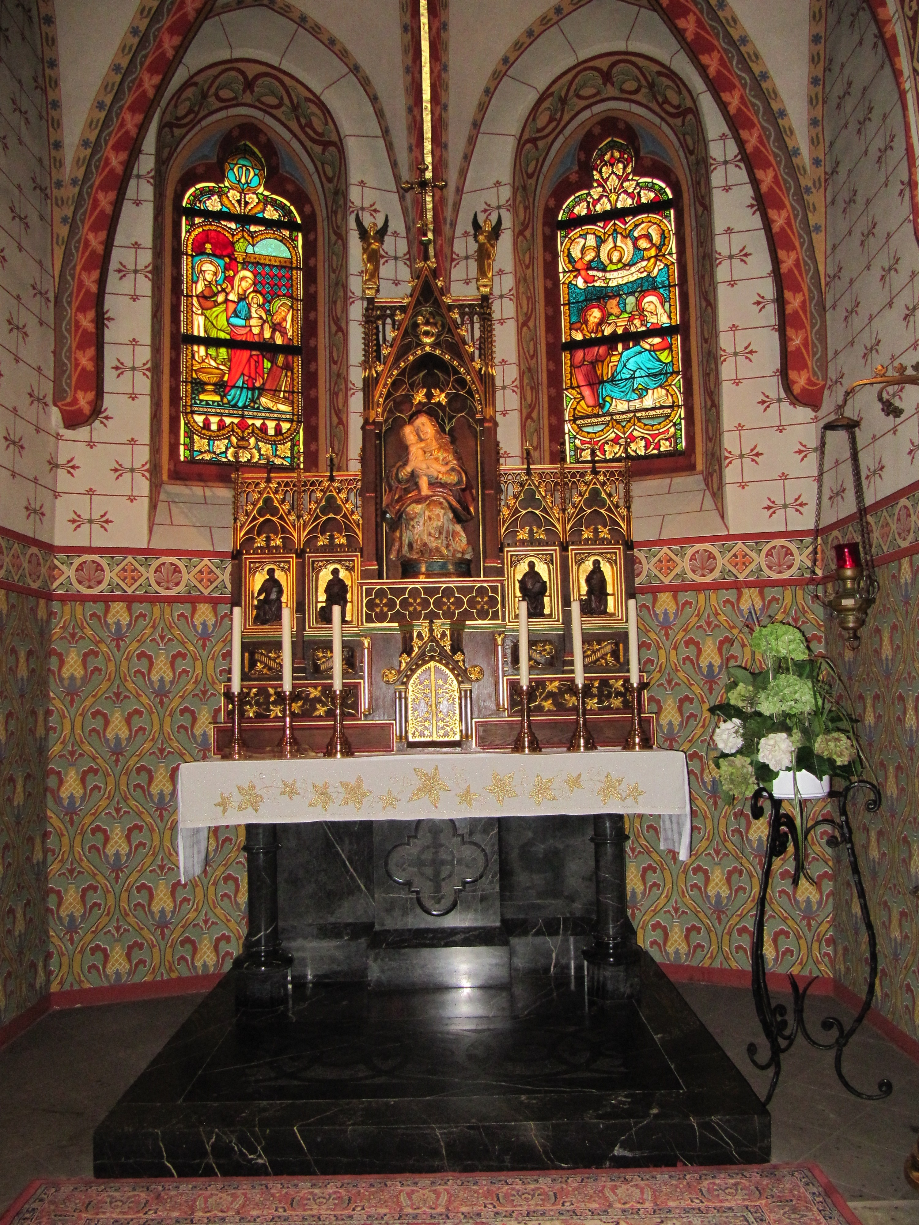 Kath. Wallfahrtskapelle Maria Hilf Beselich bei Obertiefenbach – Marmoraltar mit Altarfenster